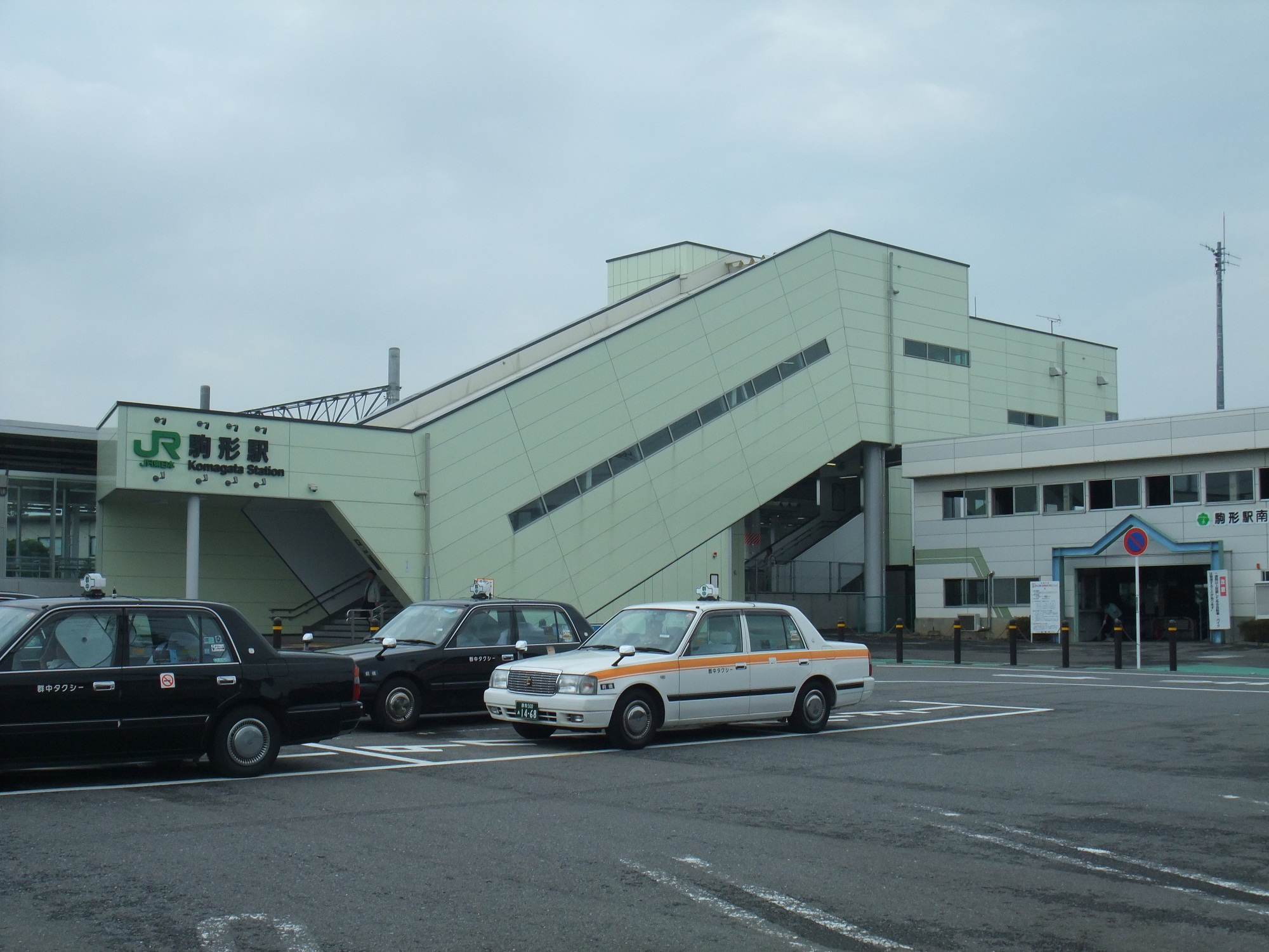 駒形駅(両毛線)